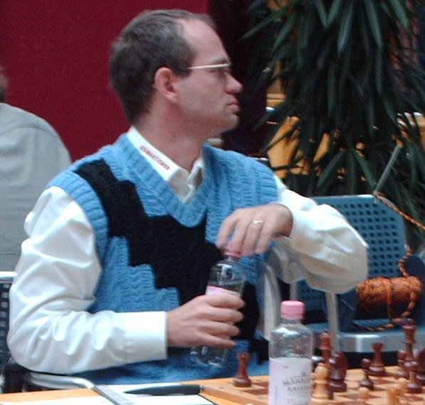 Igor Stohl am 19. November 2006 bei einem Bundesliga-Wettkampf in Berlin-Tegel